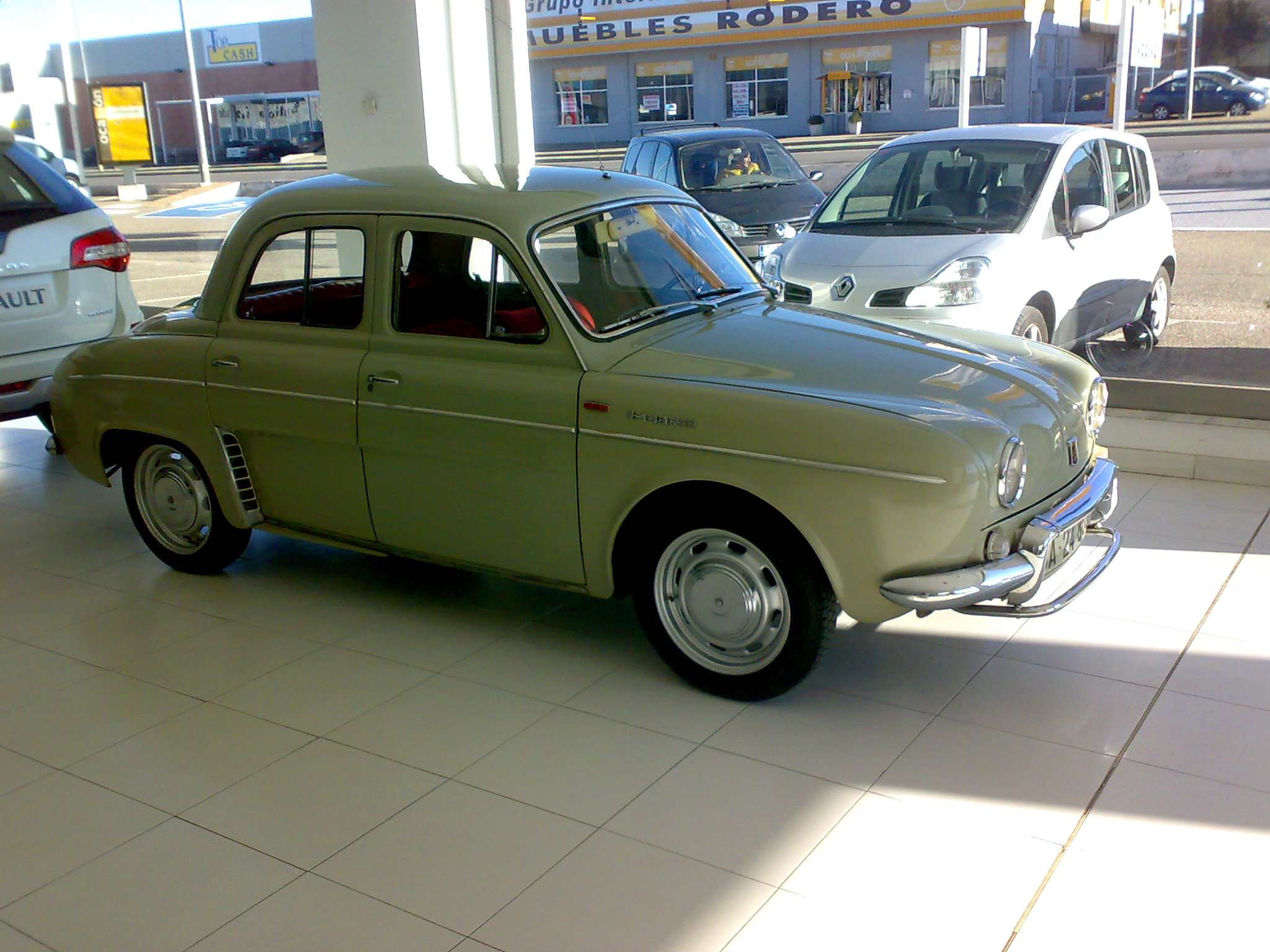 Renault modelo Gordini